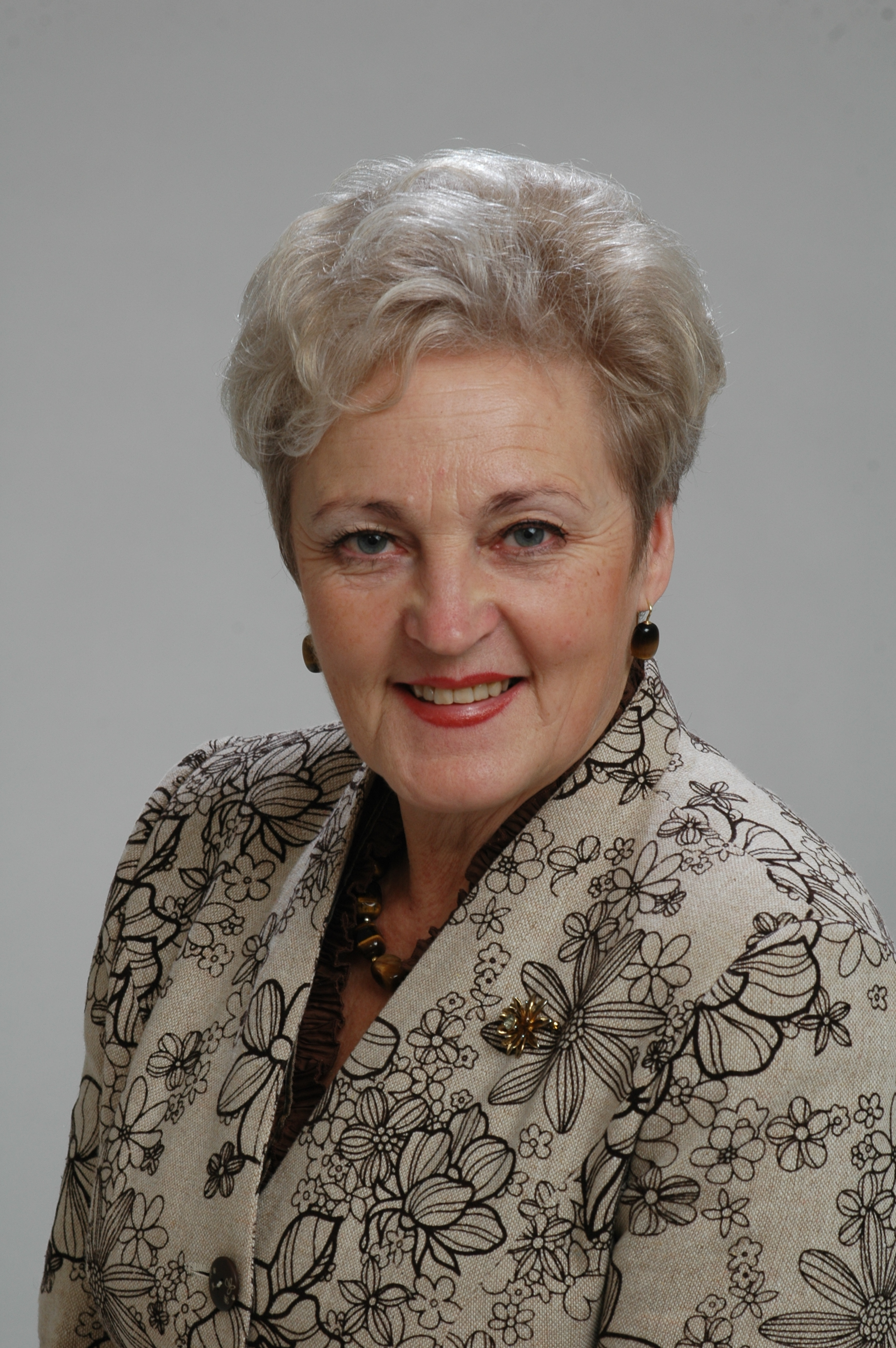 Foto: Saeima